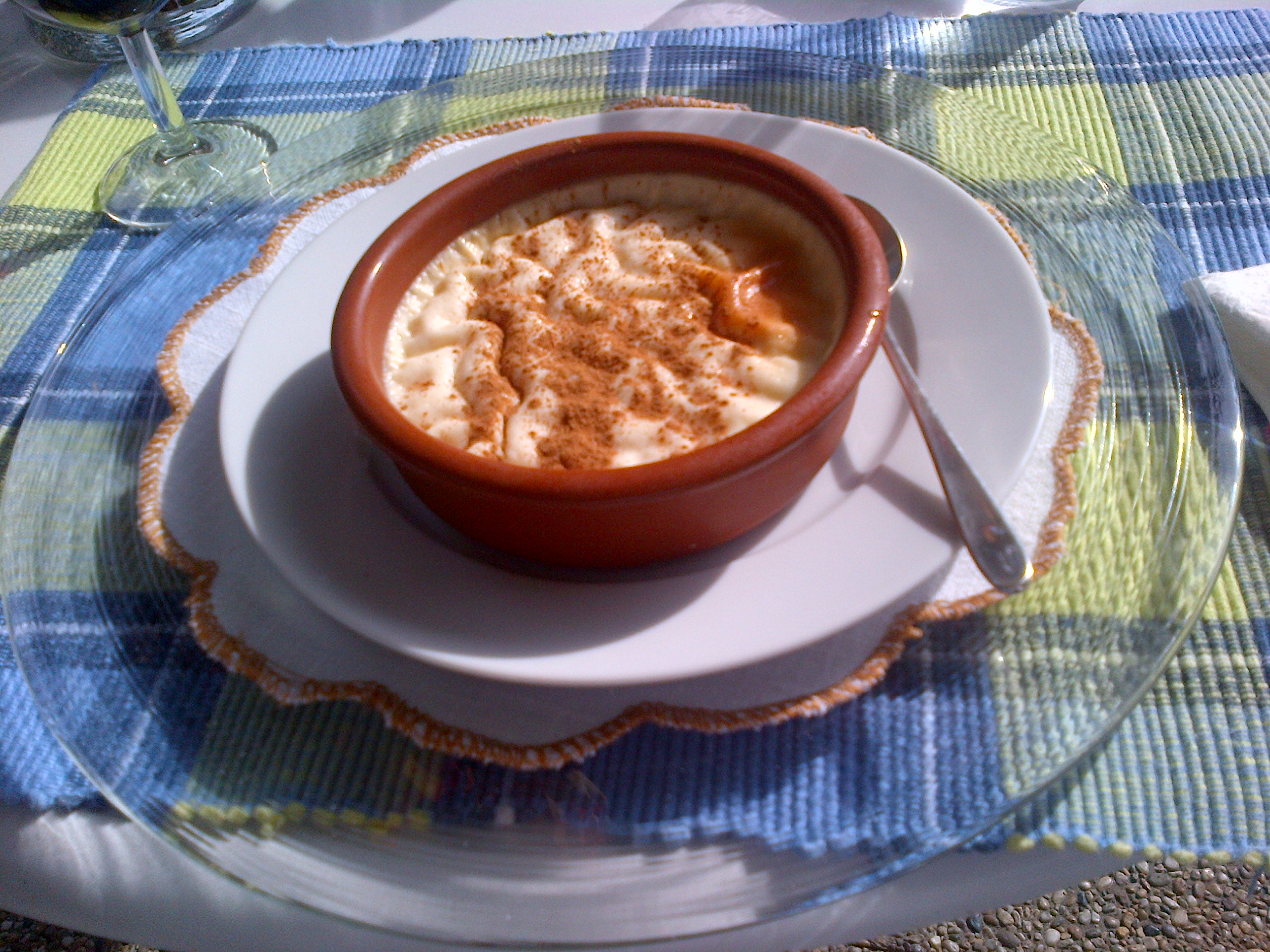 Sütlaç (arroz con leche) turco, la version convencional (sin hornear), con canela molida encima.